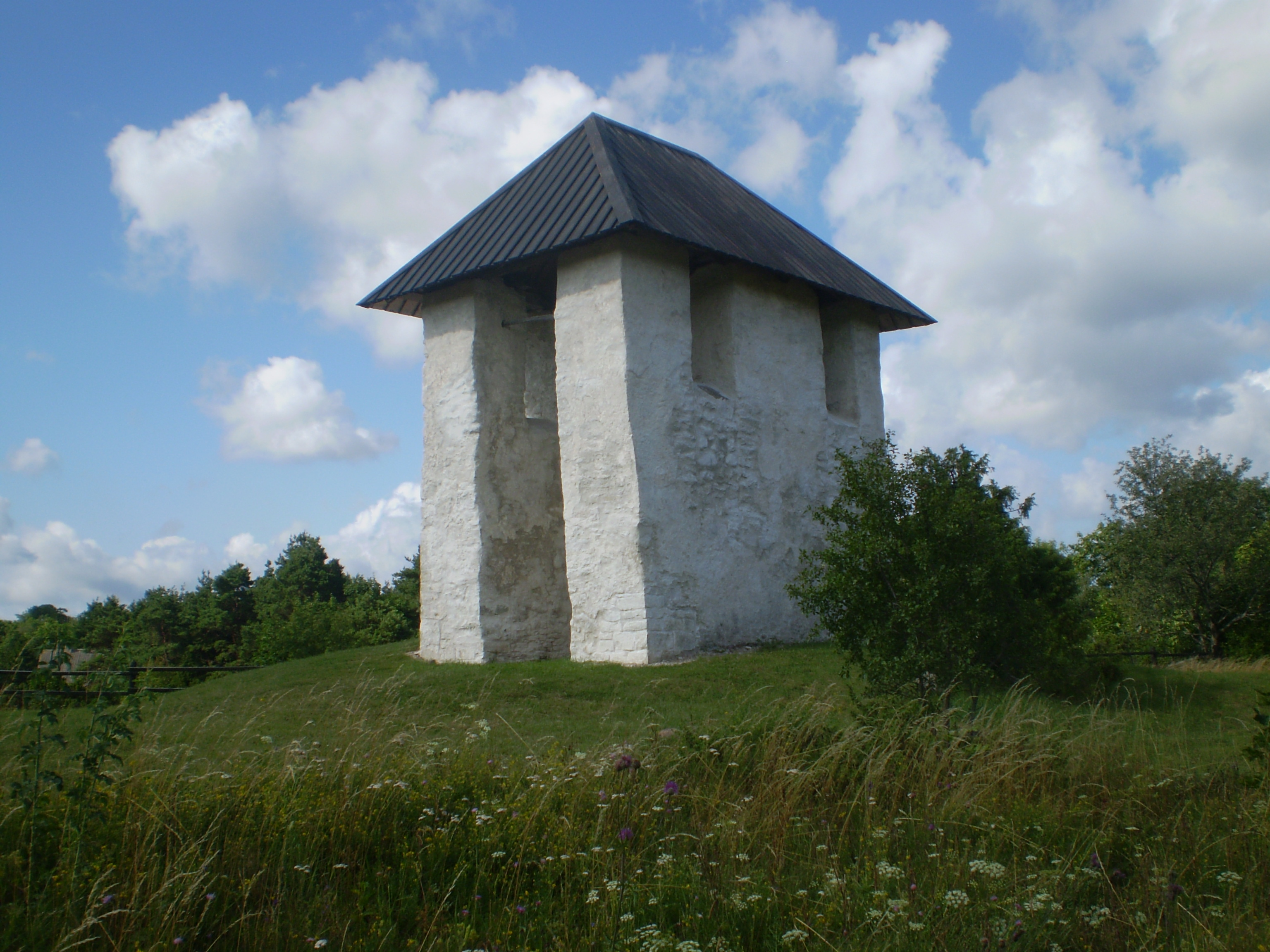 Kihelkonna kiriku kellatorn